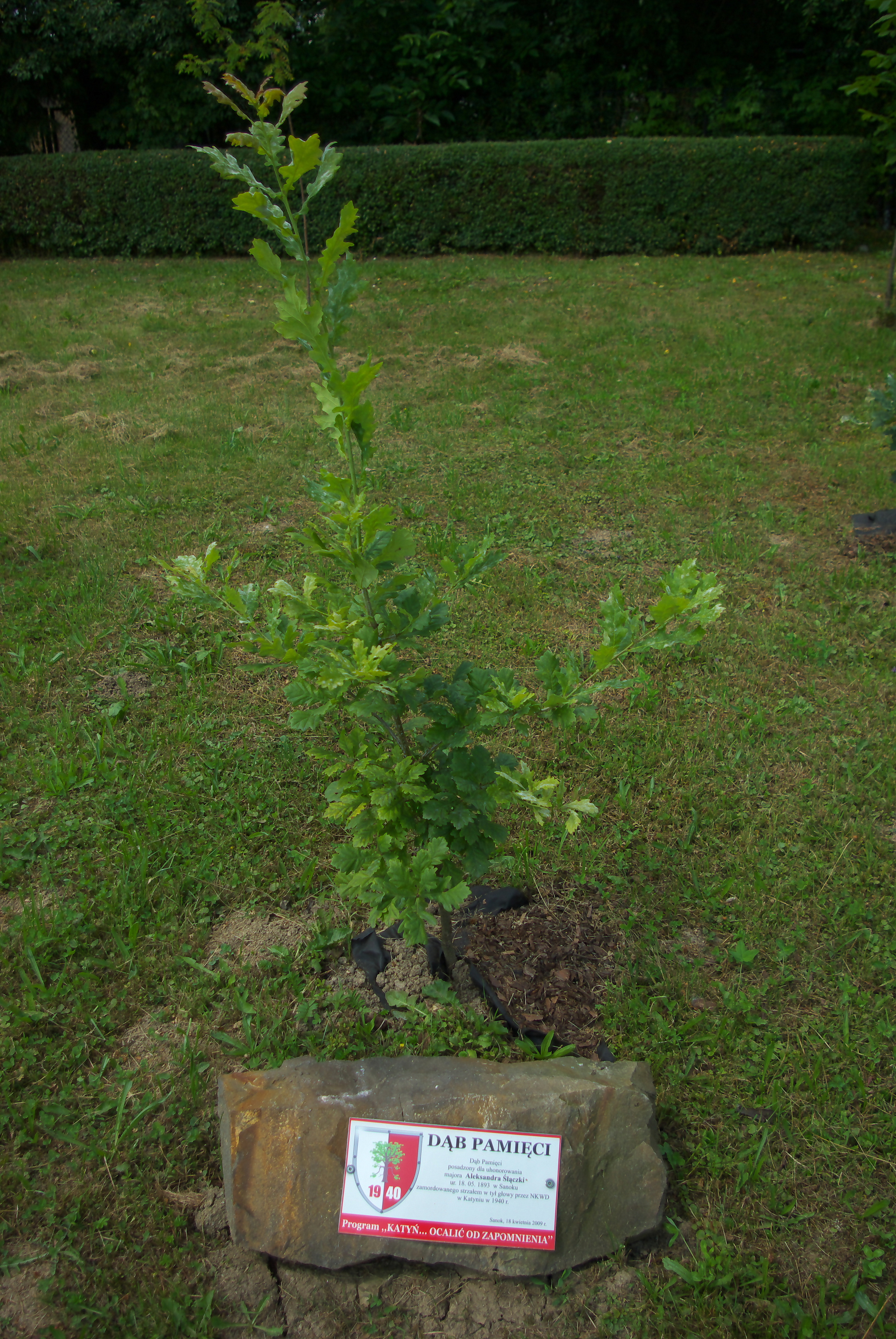 Dąb Pamięci Aleksandra Ślączki w ramach Pomnika Golgota Wschodu na Cmentarzu Centralnym w Sanoku.